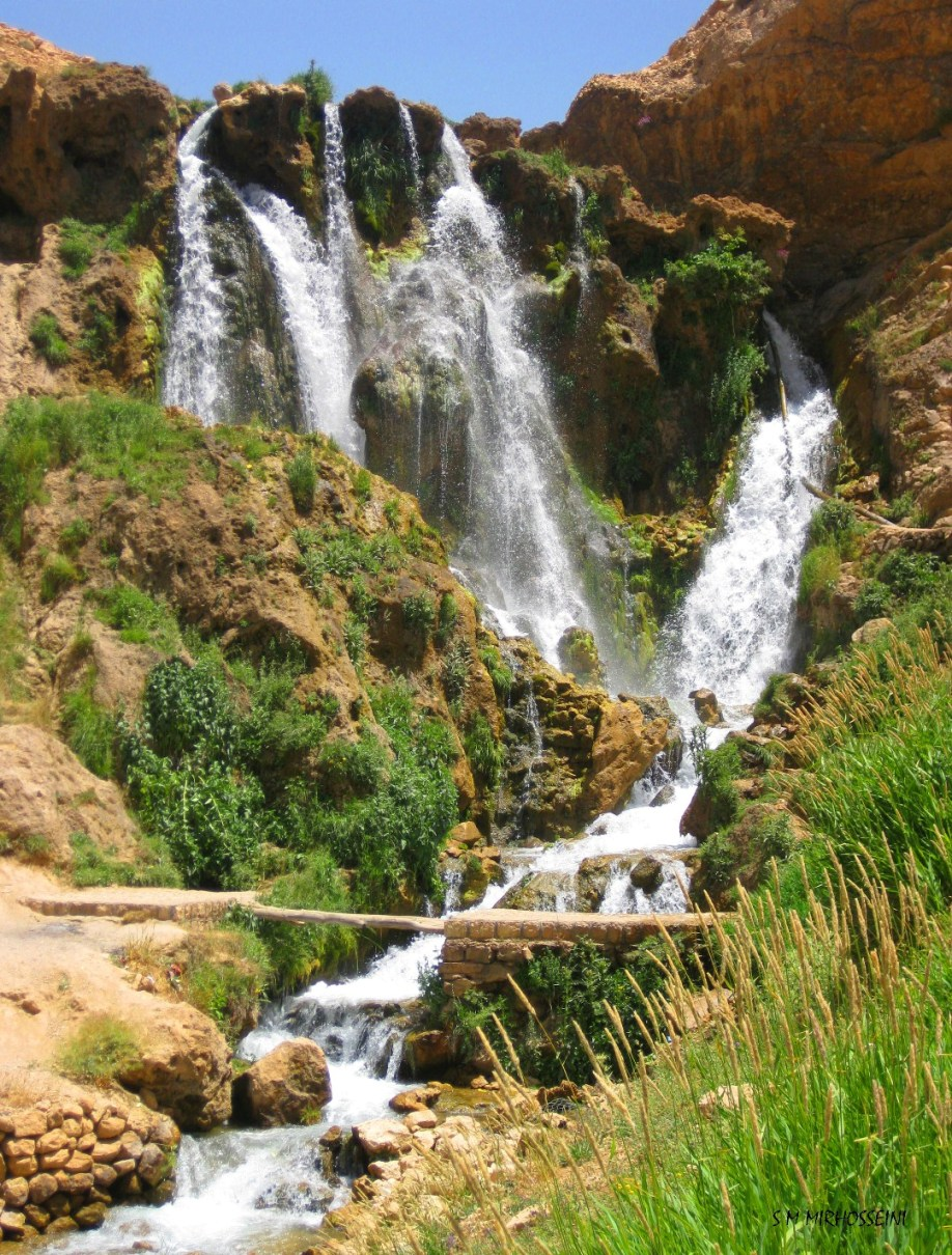 Sheykhali khan waterfall, چهارمحال و بختیاری